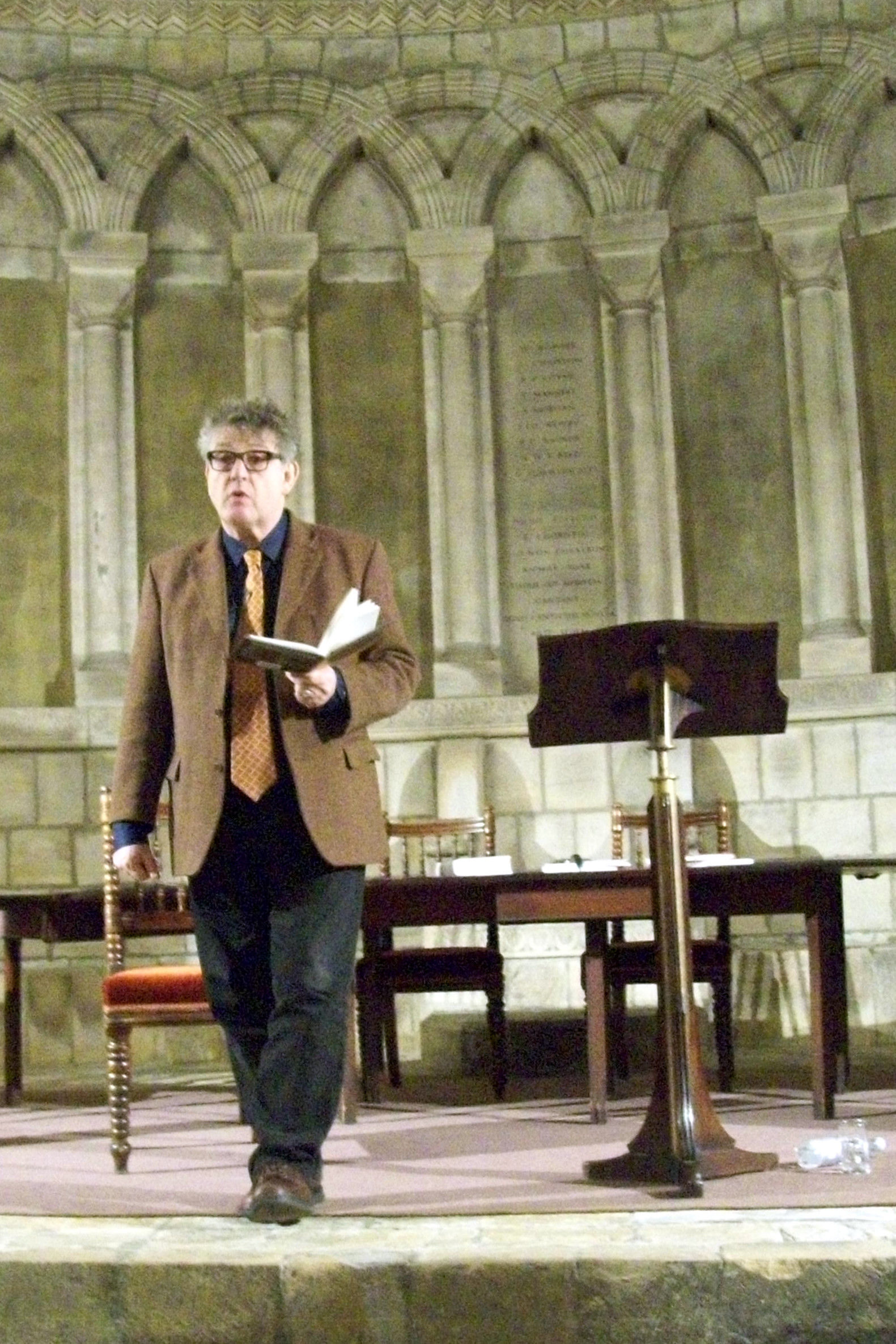 Paul Muldoon at Durham Book Festival 2013